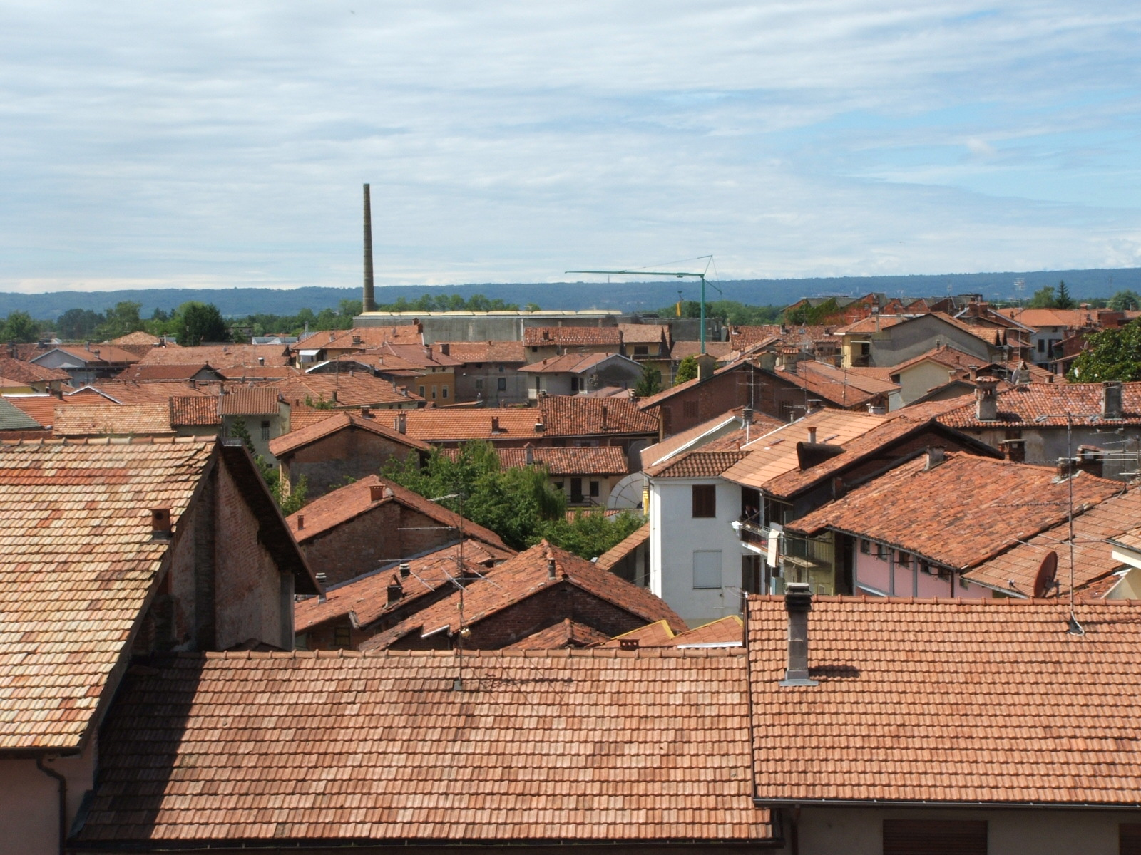 Candelo, provincia di Biella, Piemonte, Italia